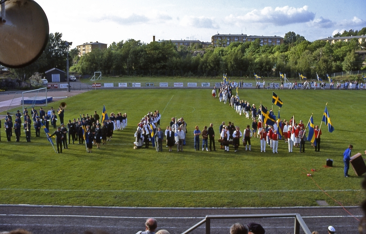 Nationaldagsfirande i Mölndal, den 6/6 1985. Inmarsch på Kvarnbyvallen.